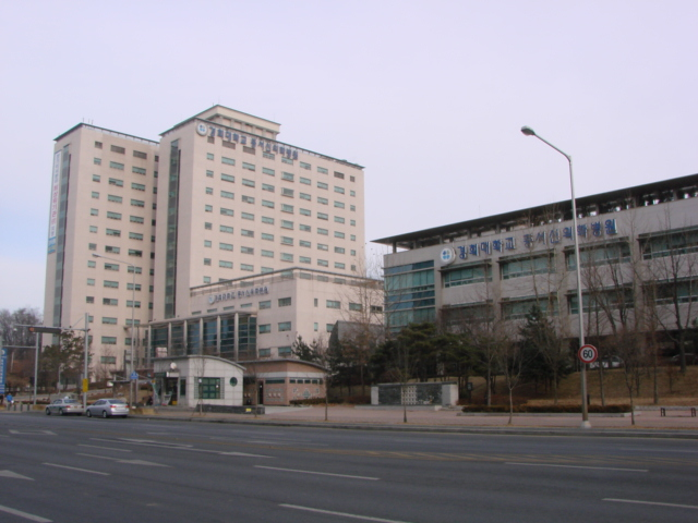 강동경희대학교병원